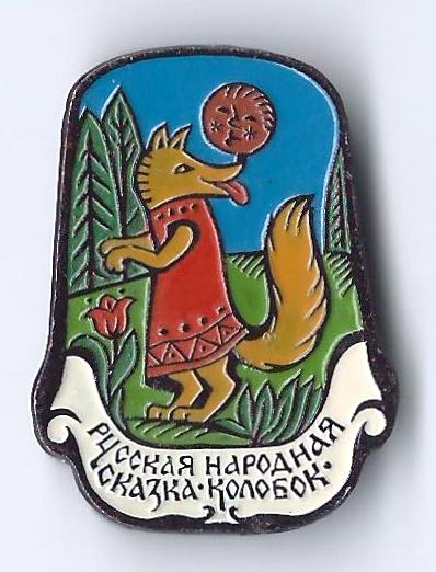 Epinglette russe "Conte populaire russe : Kolobok" (Pas de nom d'auteur ni d'origine)